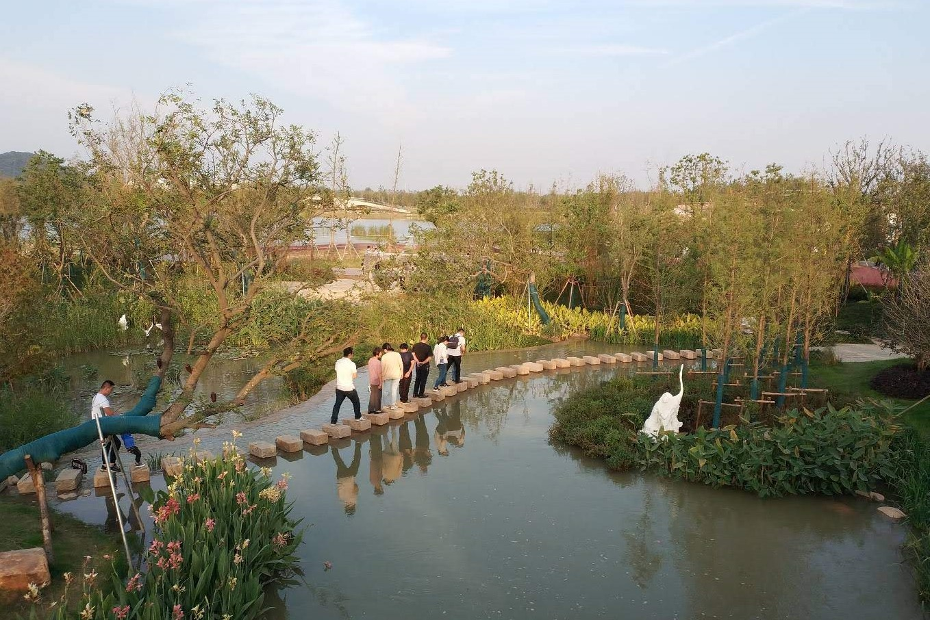 中文（中国大陆）: 仪征园博园的一处远眺